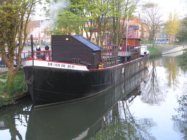 'De Oude Buis'. Het sociëteitsschip van de U.S. Histos.